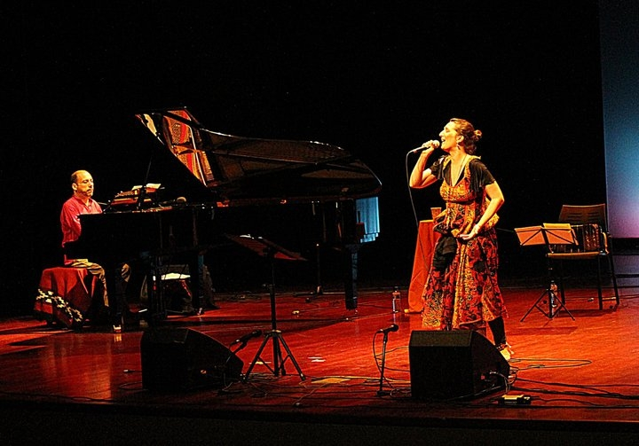 Dulce Pontes & Juan Carlos Cambas